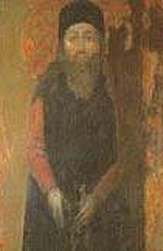 Ferdinand der Heilige, Prinz von Portugal *Quelle: *Fotograf oder Zeichner: unbekannt *Andere Versionen: *Lizenzstatus: Public Domain